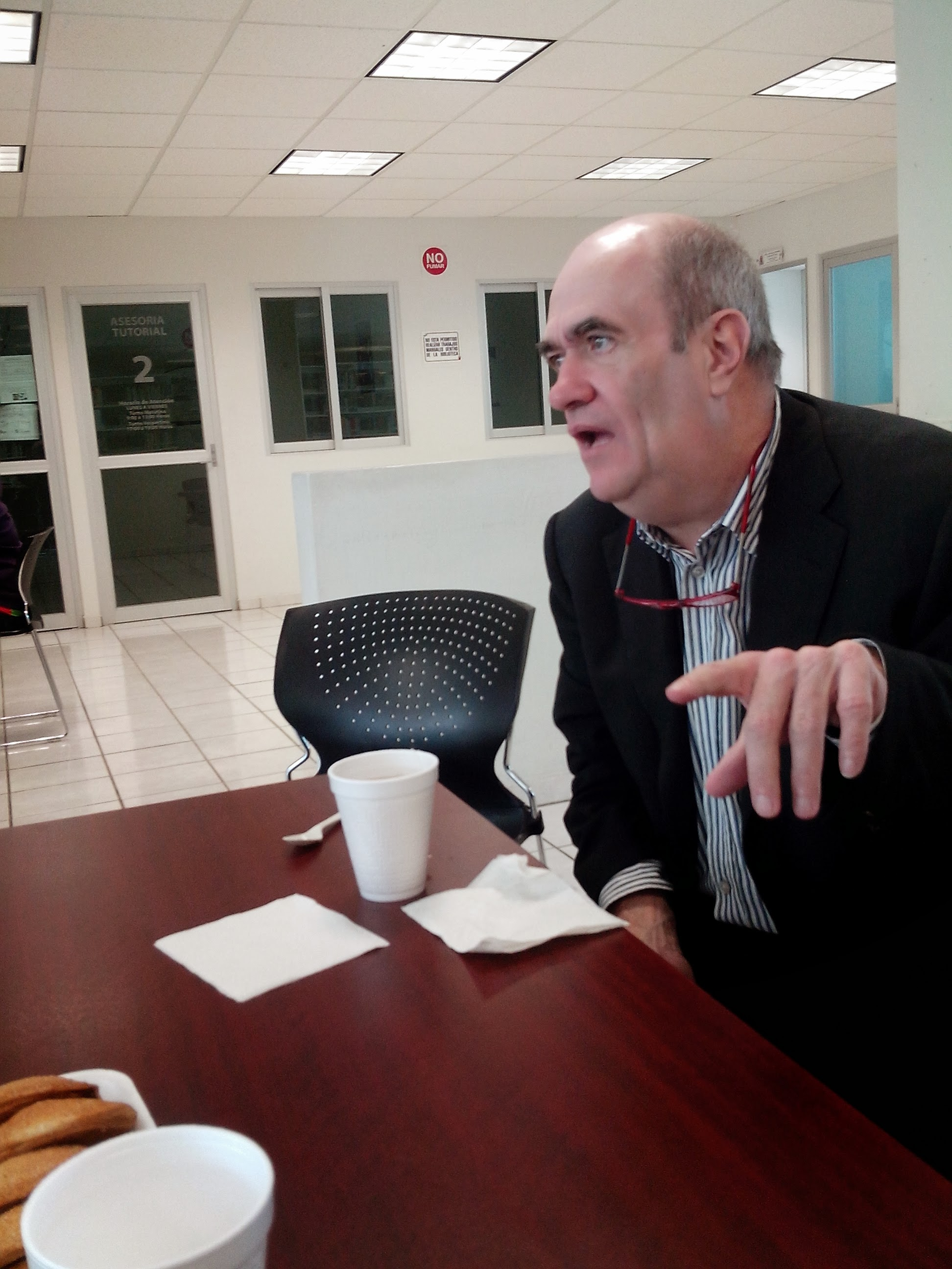 El escritor irlandés Colm Tóibín en Guadalajara